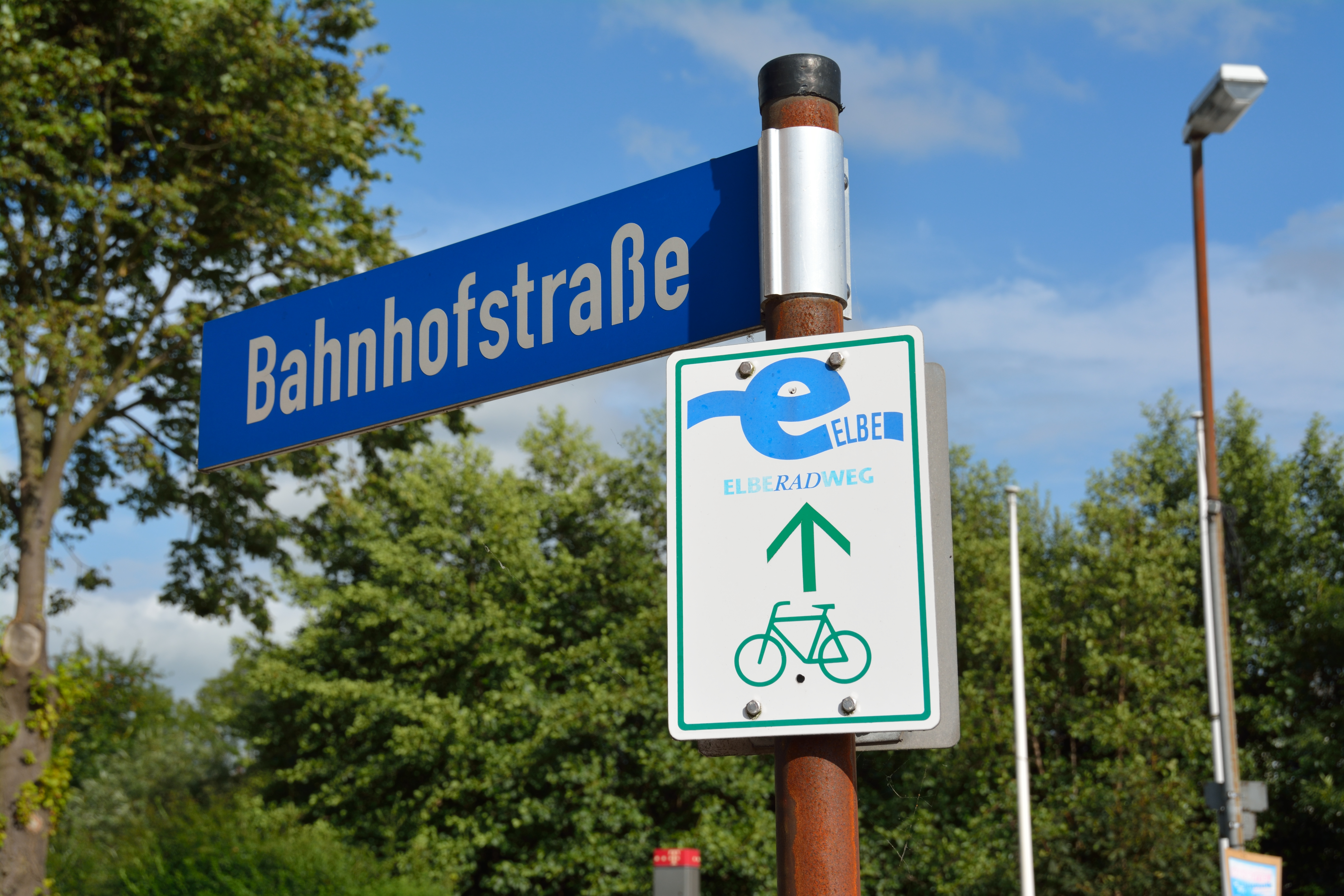 Brunsbüttel, Himweis Elbe-Radweg